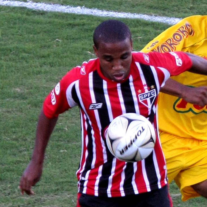 O jogador de futebol Borges, Humberlito Borges Teixeira, pelo São Paulo FC.